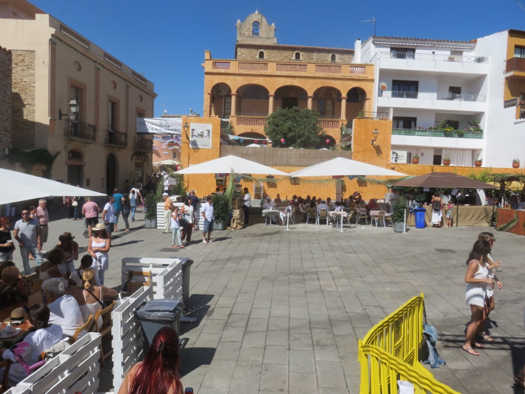 Fira d'Indians 2015. Plaça Lluís Esteve Cruañas